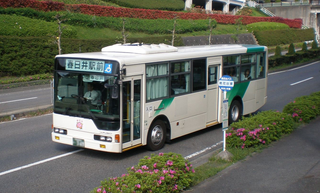 愛知県小牧市で運行されている桃花台バスの車両（撮影場所：小牧市光ヶ丘6丁目・桃花台ニュータウン）